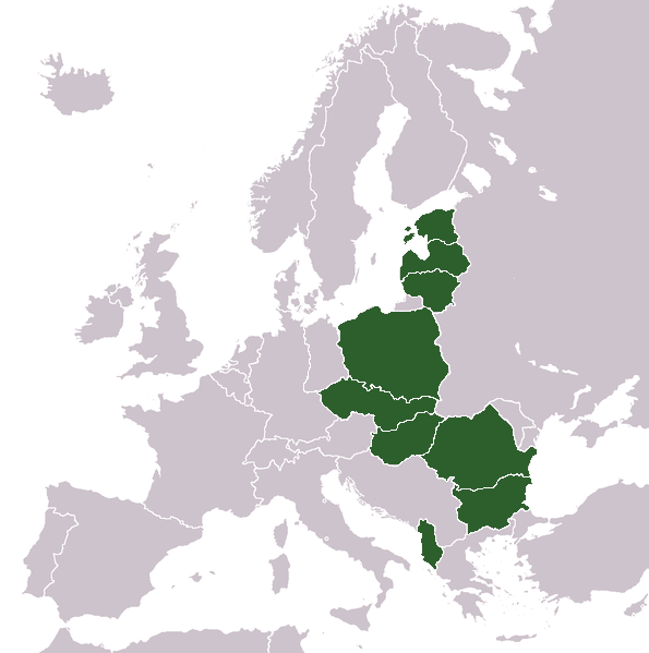 ACEN members.